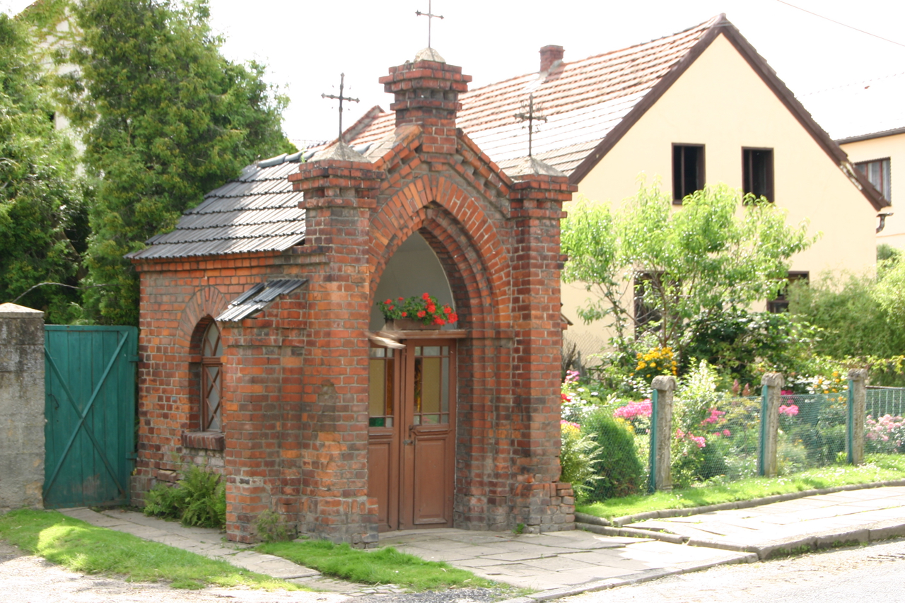 Kaplica w Śmiczu (dodatkowa nazwa w j. niem. Schmitsch) – wieś w Polsce położona w województwie opolskim, w powiecie prudnickim, w gminie Biała.